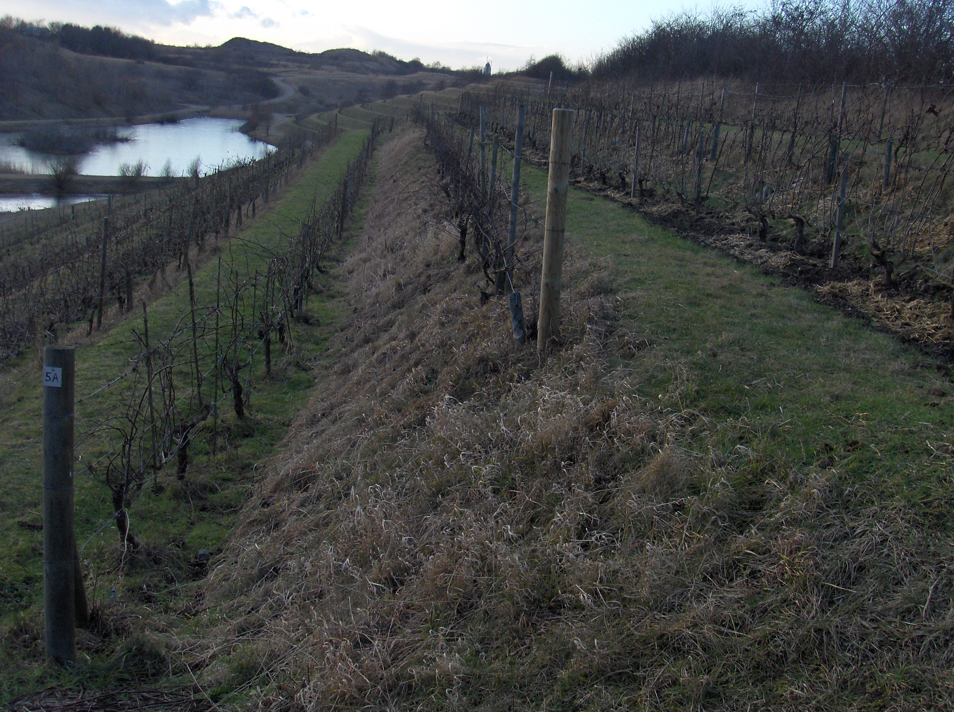 Vinterrasser i Hedeland